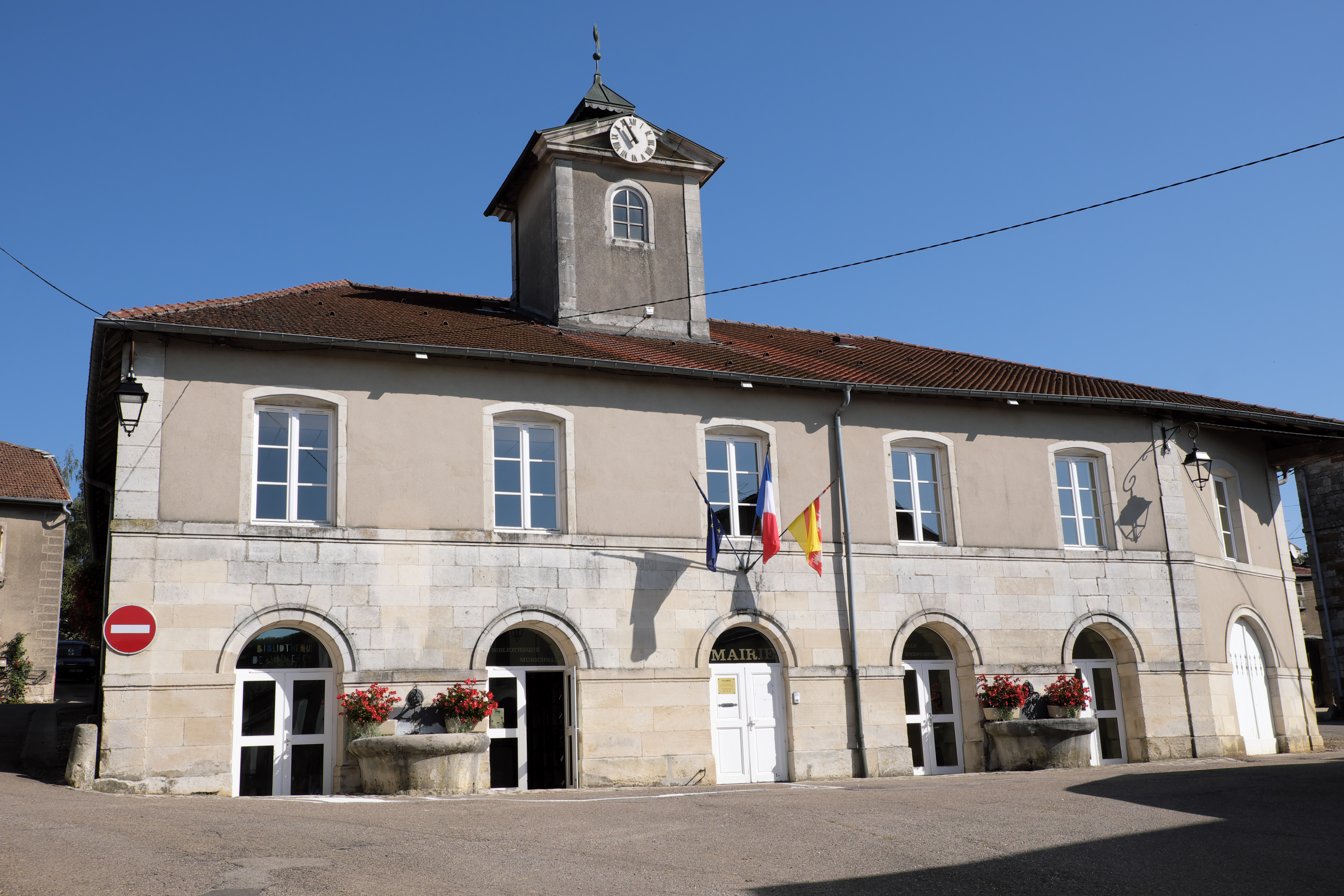 Façade sud de la mairie de Vicherey dans le département des Vosges. .